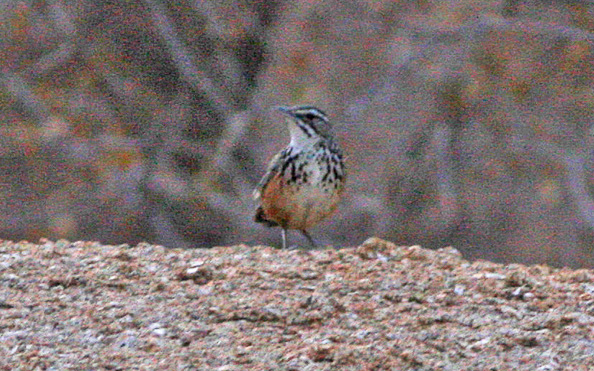 Omararu to Swakopmund